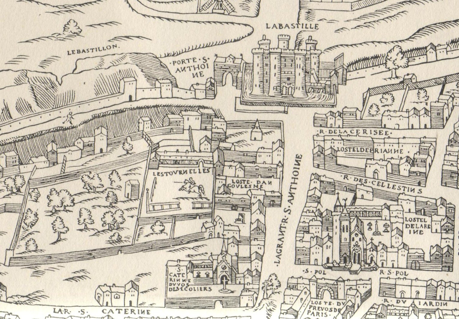 Hotel des tournelles à Paris et alentours vers 1550